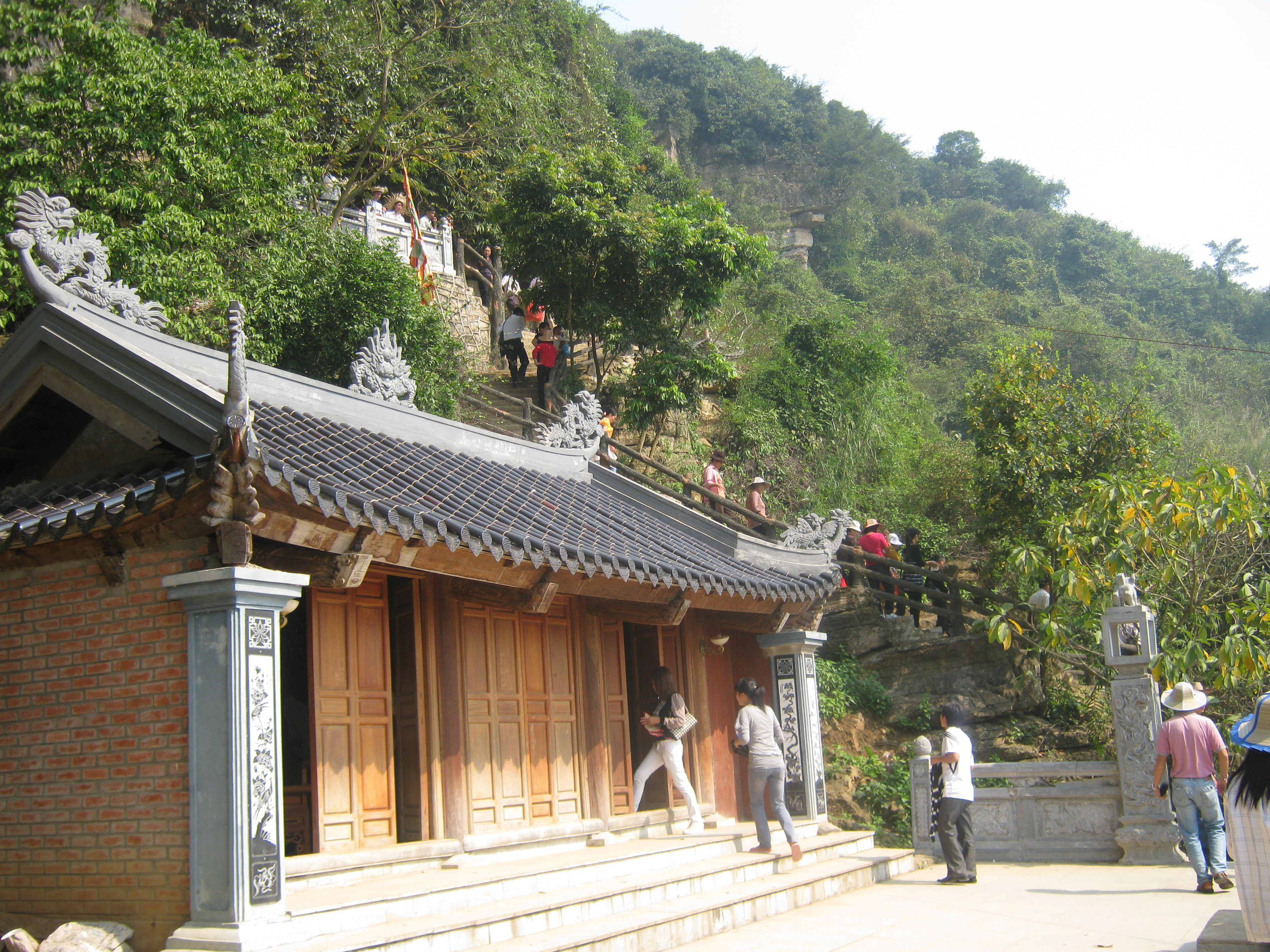 Ảnh chụp tại khu chùa Bái Đính tỉnh Ninh Bình.